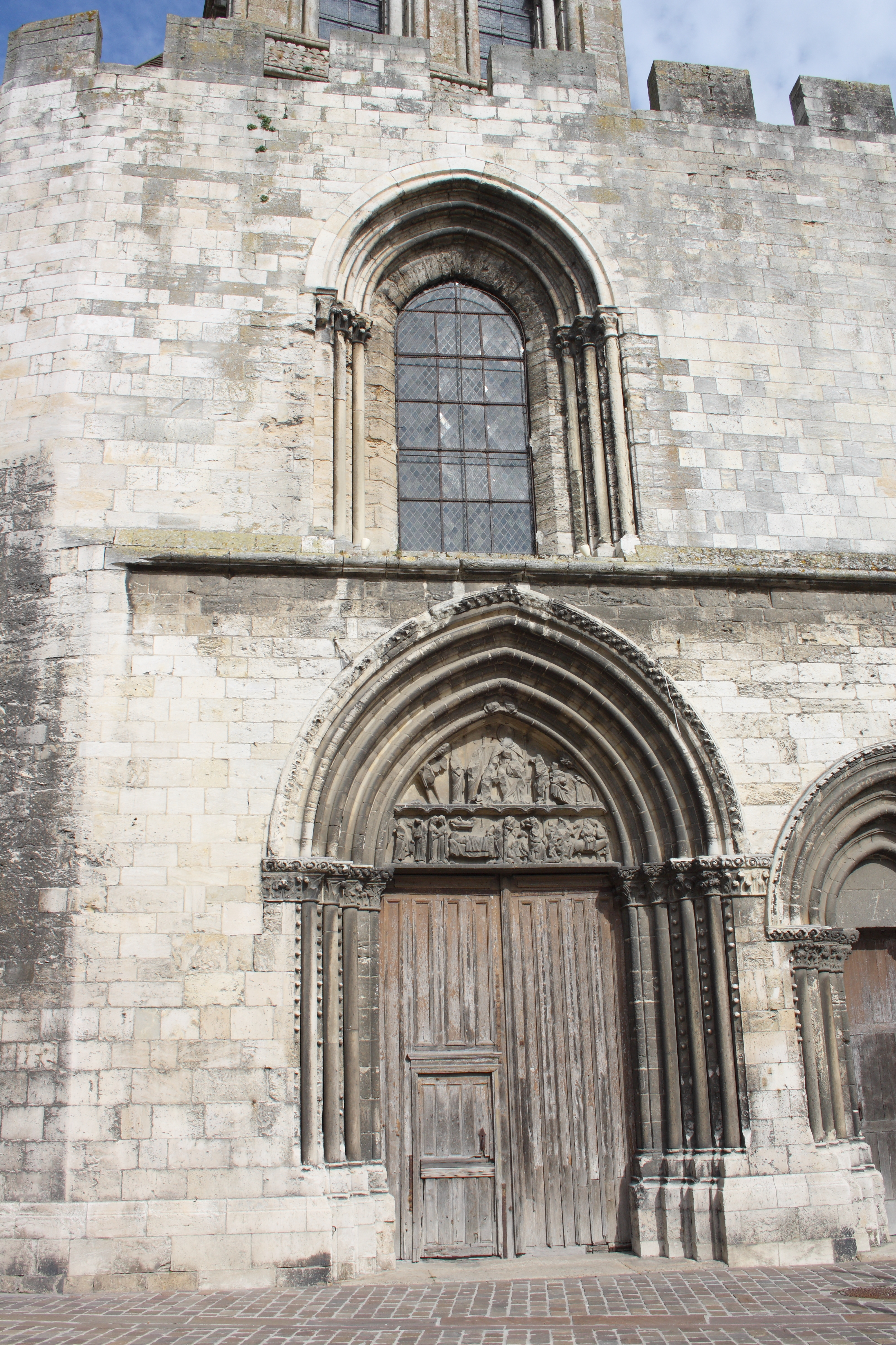 Kirche Notre-Dame-du-Fort in Étampes